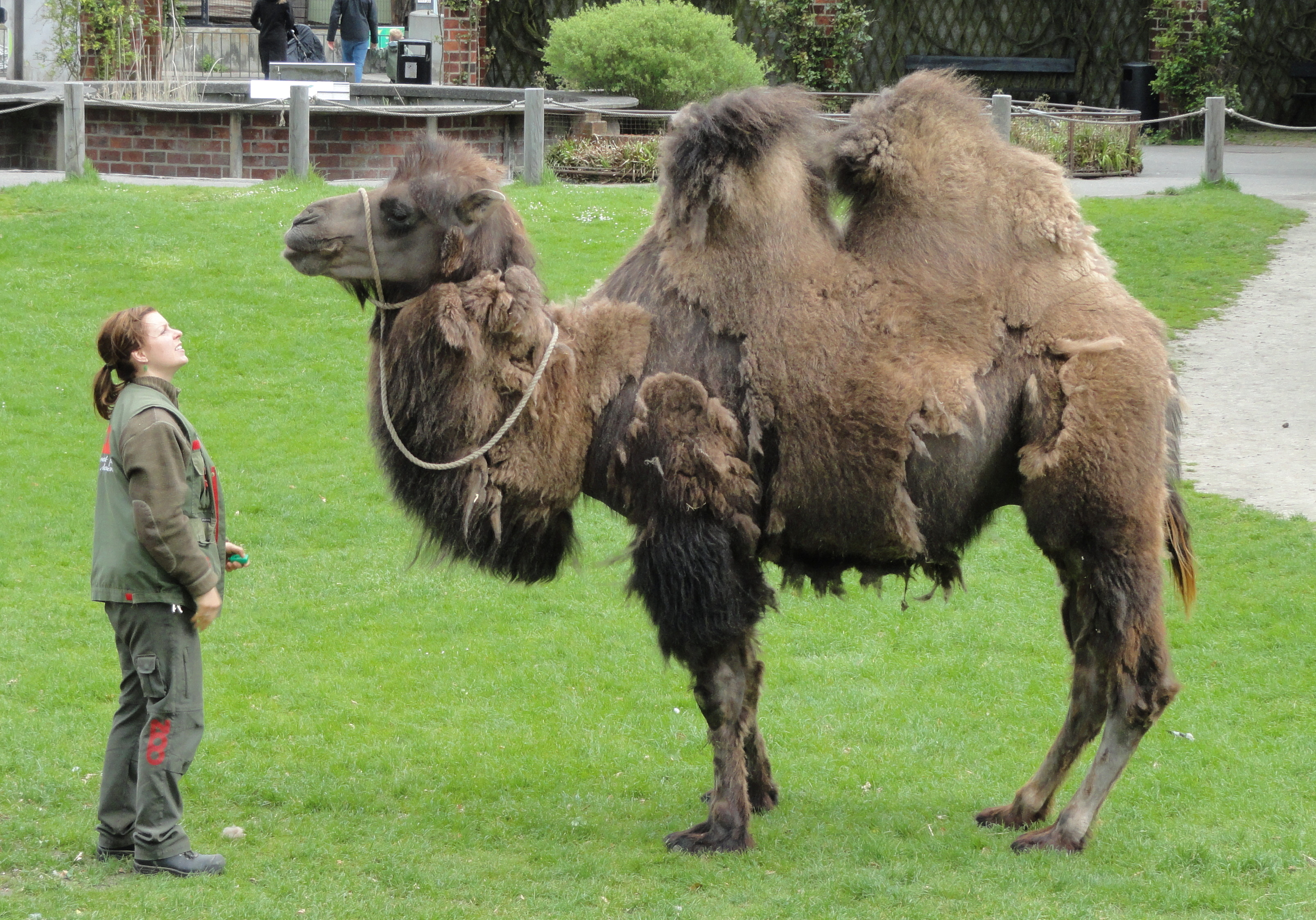 Copenhagen Zoo, Frederiksberg, Copenhagen, Denmark.